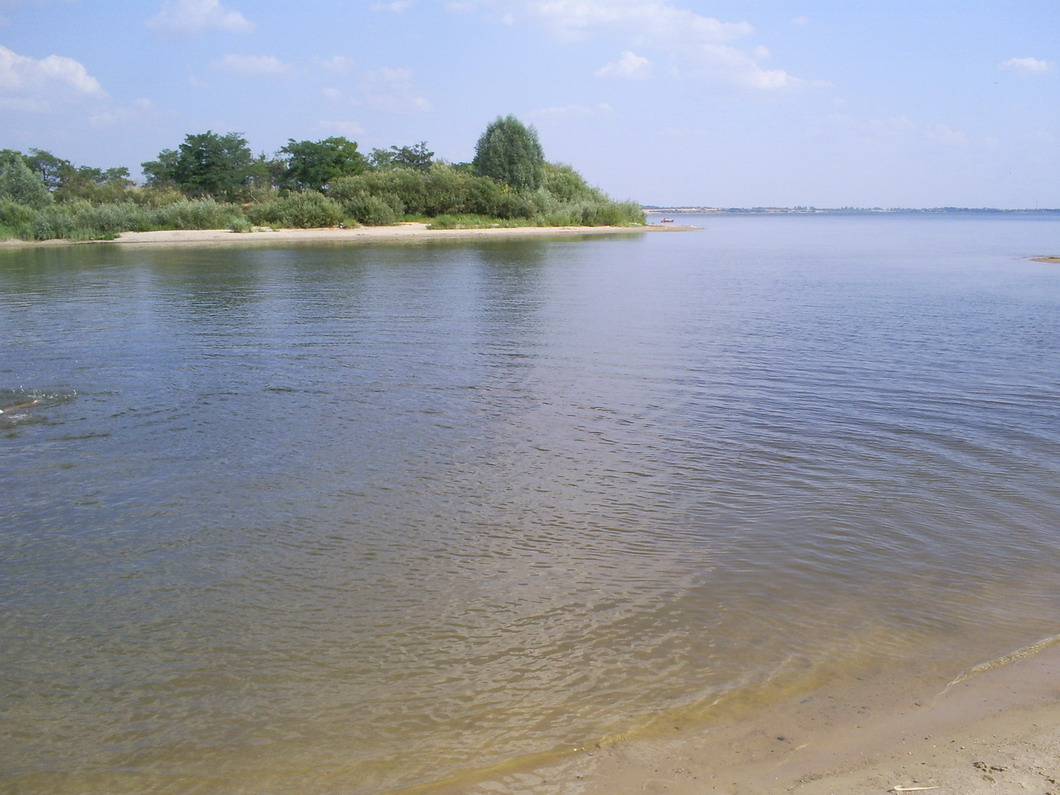 Вештачко језеро Језиорско. Поглед са плаже на вештачко острво. (Пољска) 25.07.2006. Author:Jovan Vuković If you need this picture with biger rezolution ask me there.